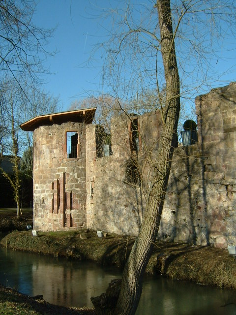 Burg in Bad Vilbel